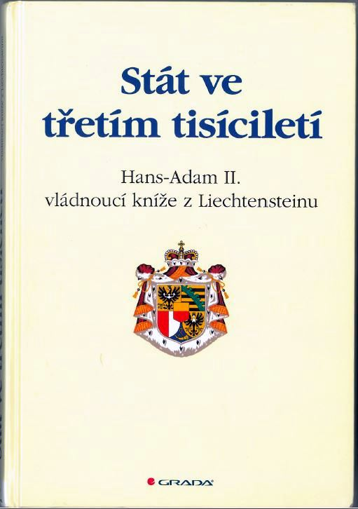 Stát ve třetím tisíciletí / Der Staat im dritten Jahrtausend